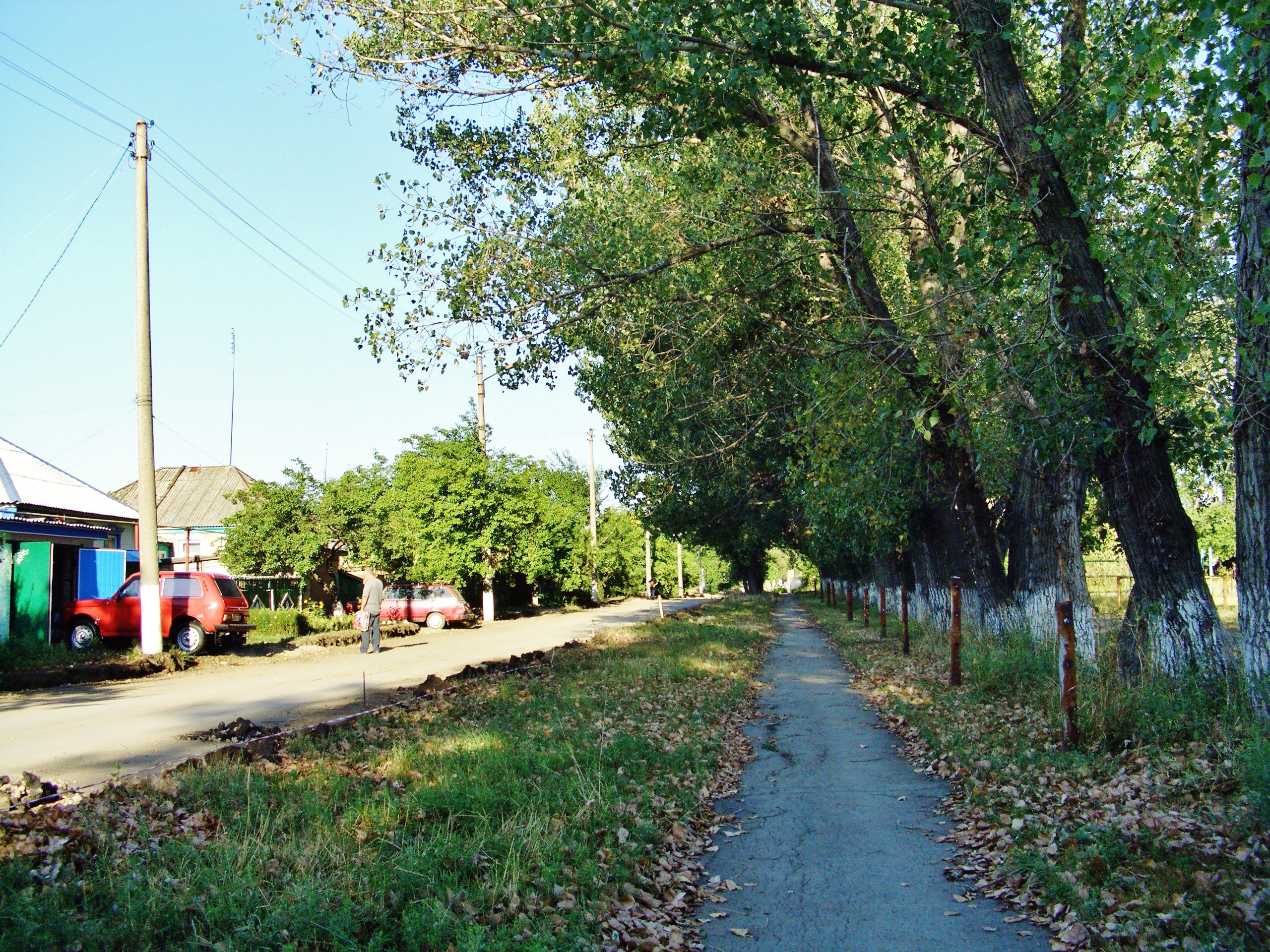 Sholokhovskiy, Rostovskaya oblast', Russia, 347022